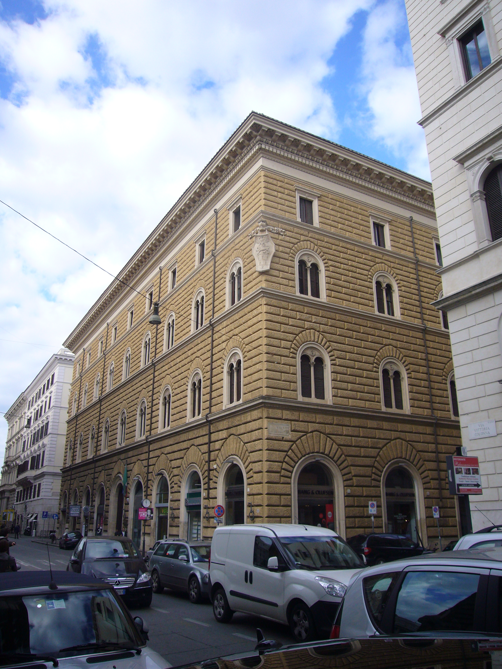 Roma, via Vittoria Colonna angolo via Cavallini, palazzo Odescalchi-Simonetti